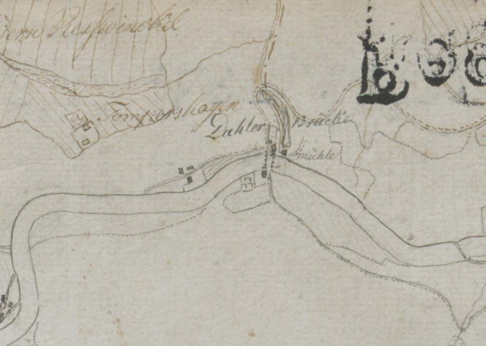 Handrisse (Mensalblätter) zur Karte der Grafschaft Mark von Eversmann um 1795 Ausschnitt Dahlerbrück